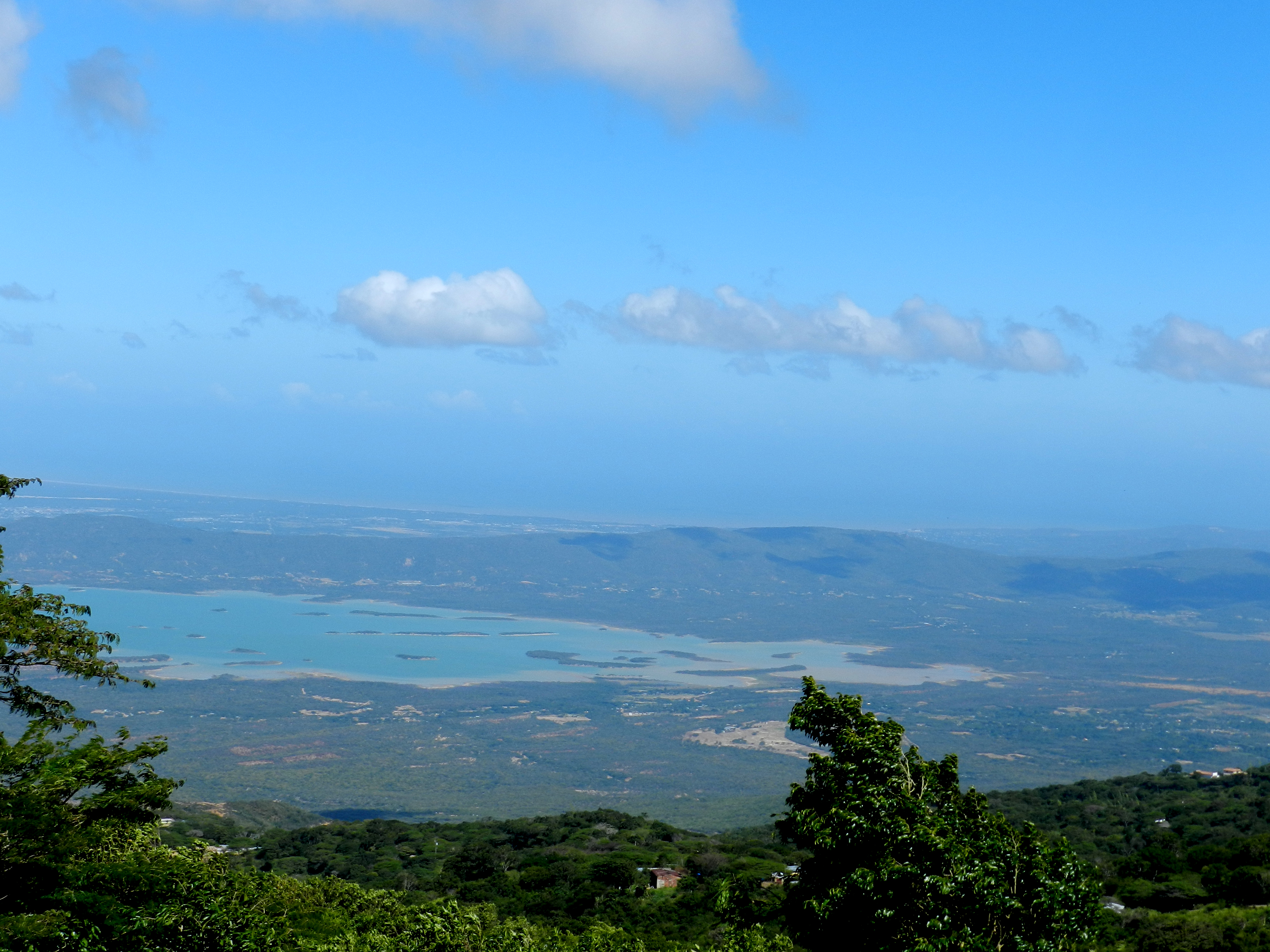 Cumbre del Cerro Galicia, Curimagua,Sierra de San Luis, Estado Falcón